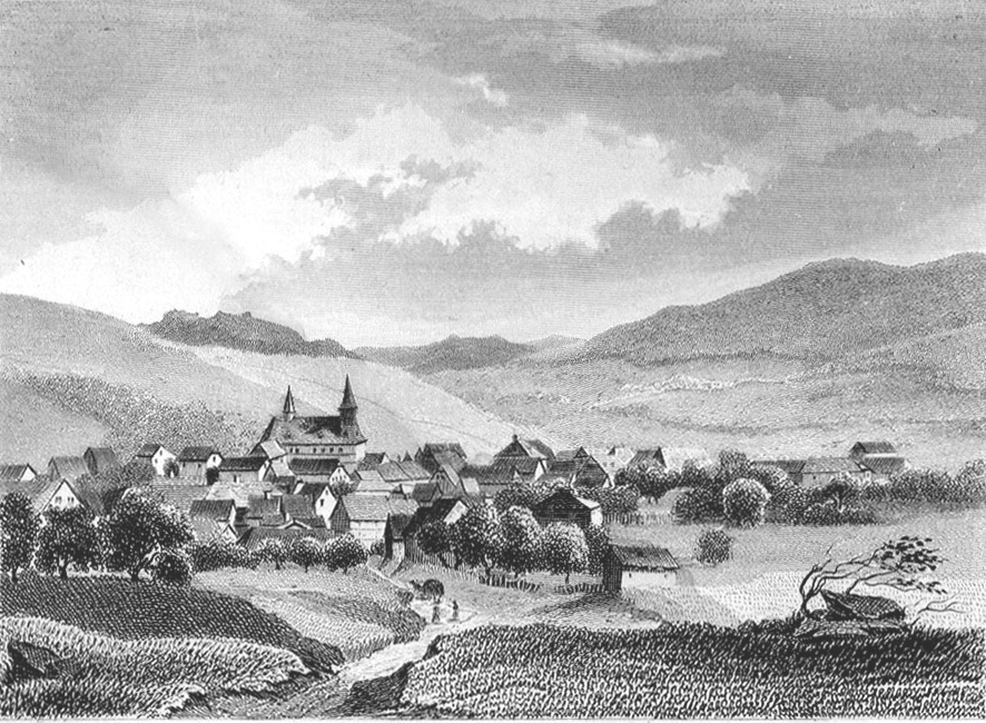 Gladenbach, 1849, Stahlstich auf Papier · schwarz-weiß